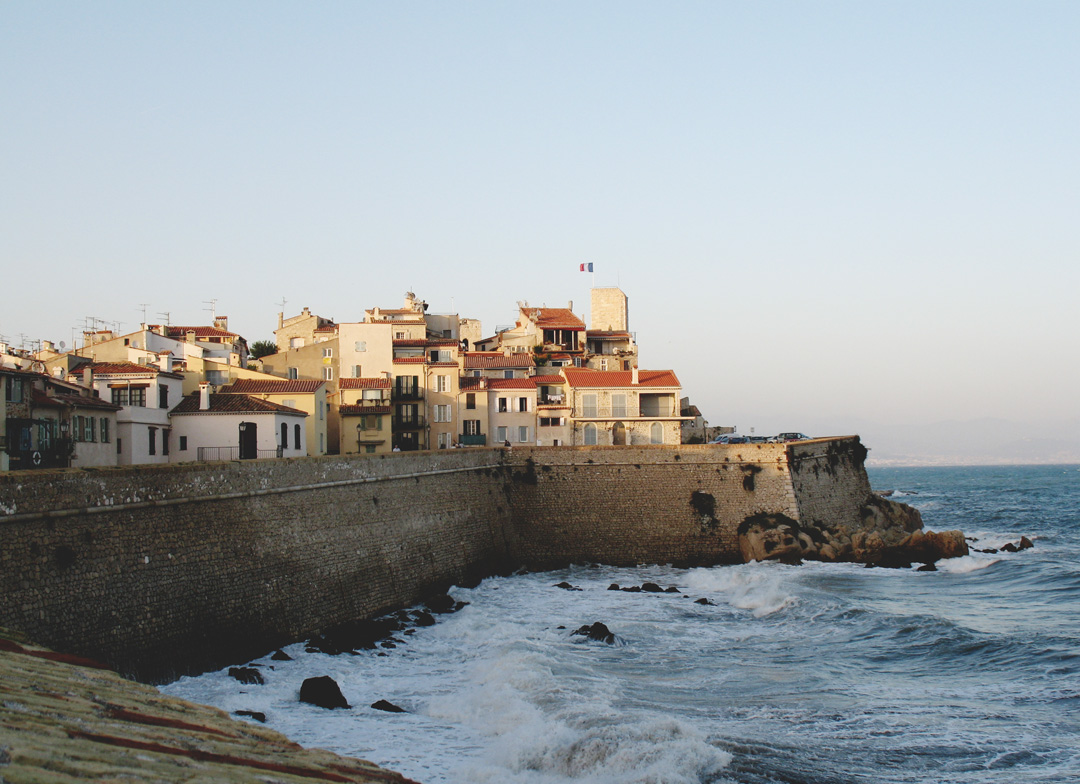 Bord de mer à Antibes, France